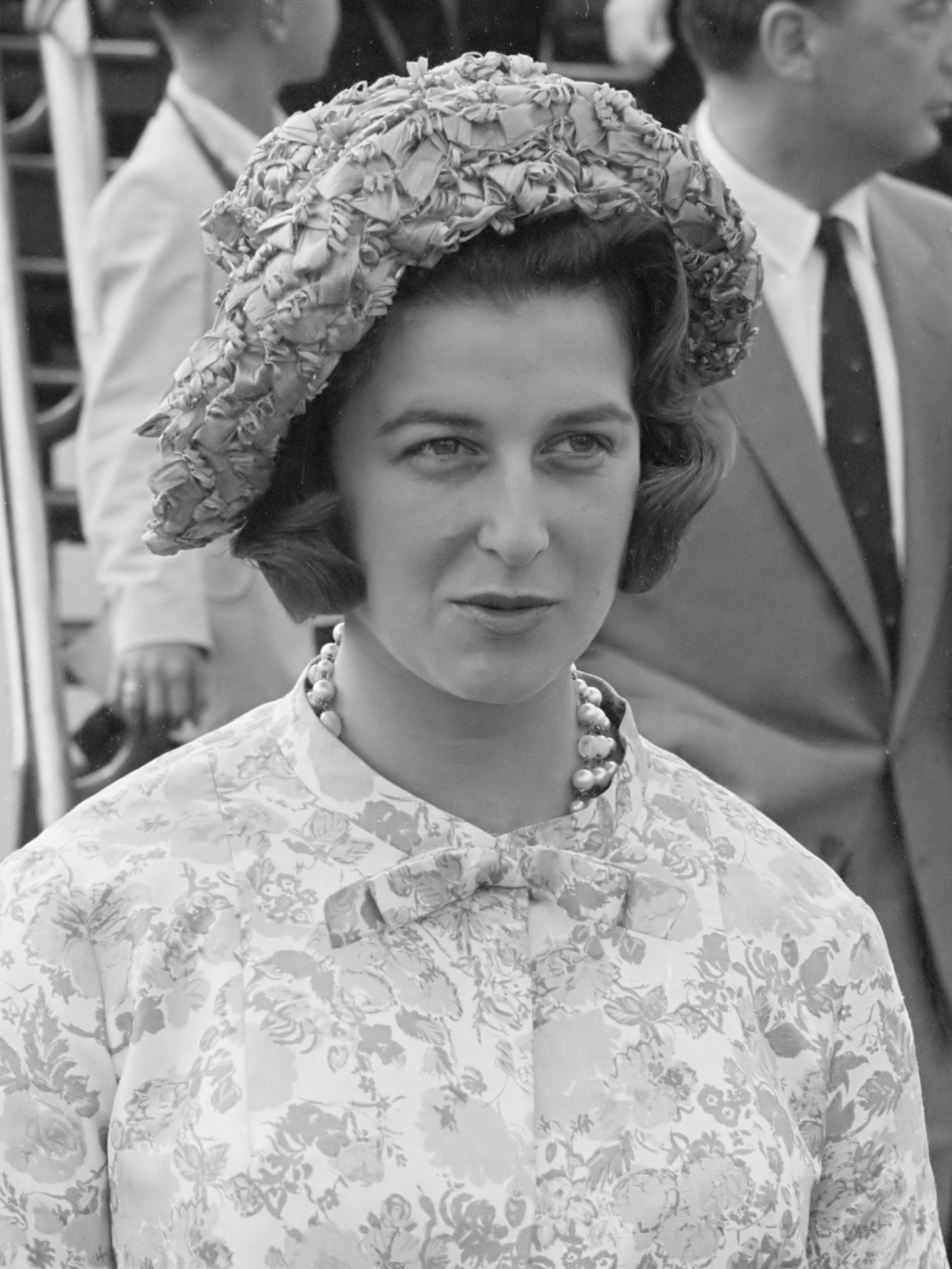 Aankomst Prinses Alexandra op Schiphol. 29 juni 1961